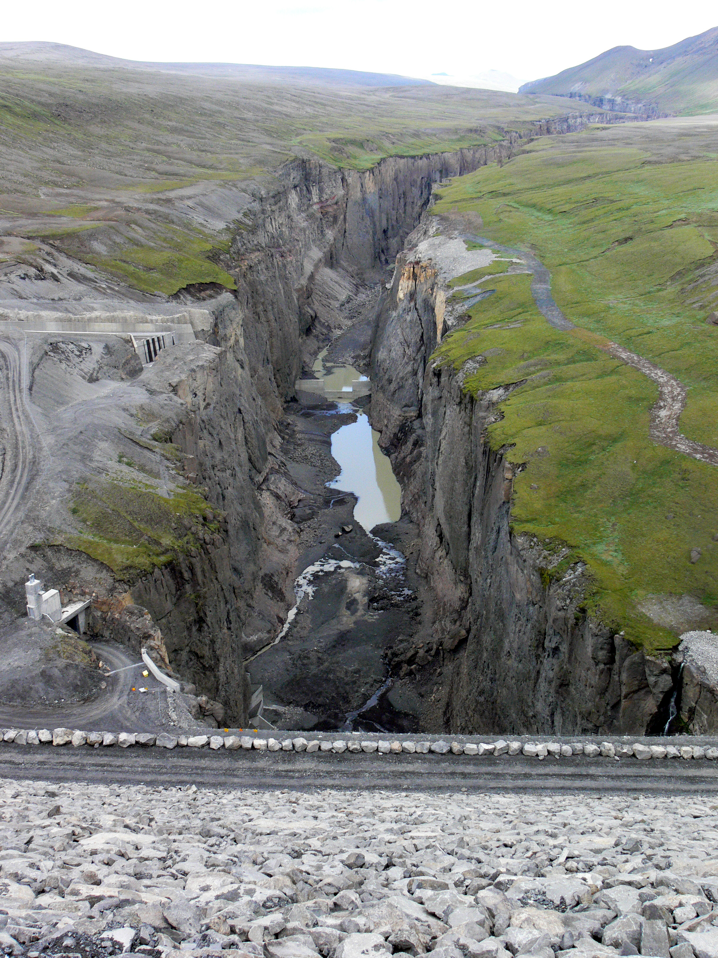 Schlucht zwischen Hafrakvammagljúfur und Dimmugljúfur unterhalb des Staudamms Kárahnjúkur.